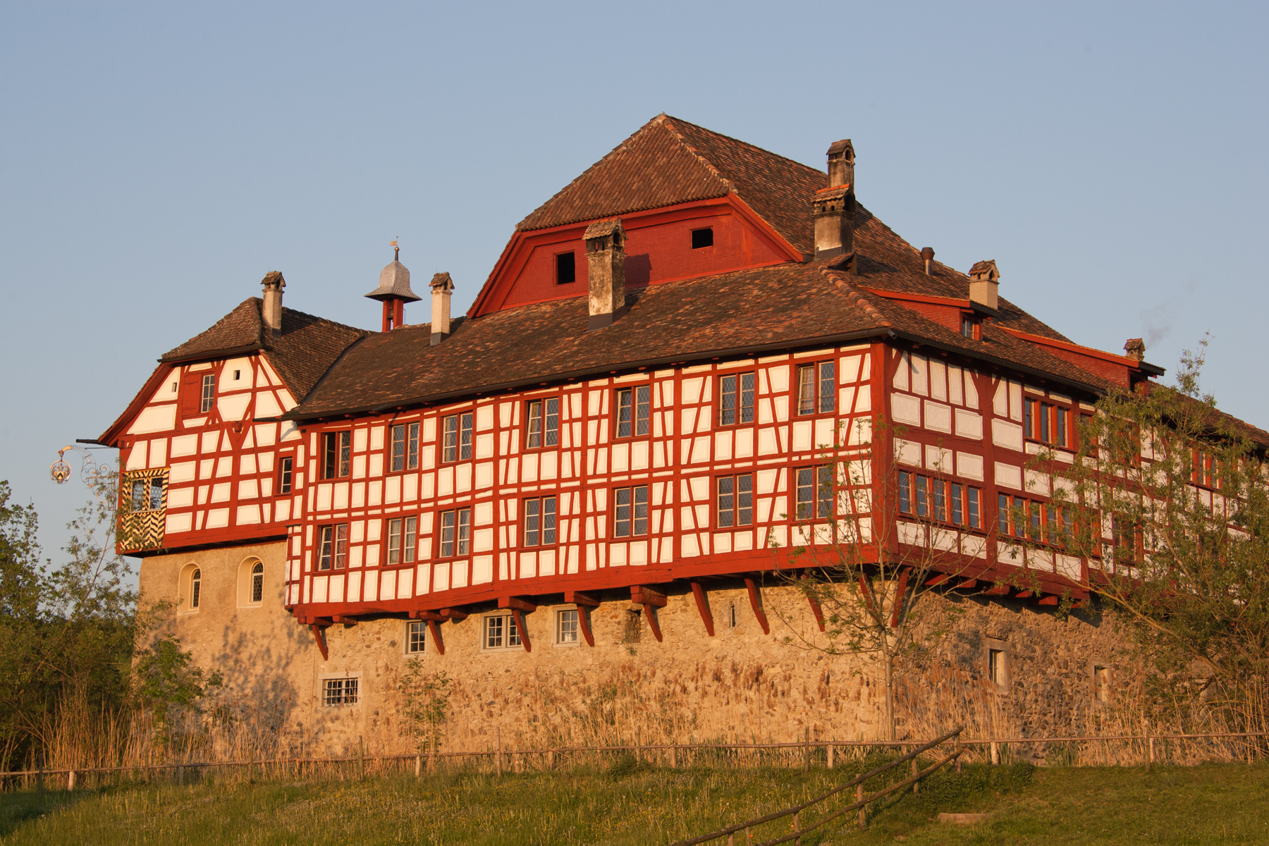 Weiherschloss Hagenwil bei Sonnenaufgang